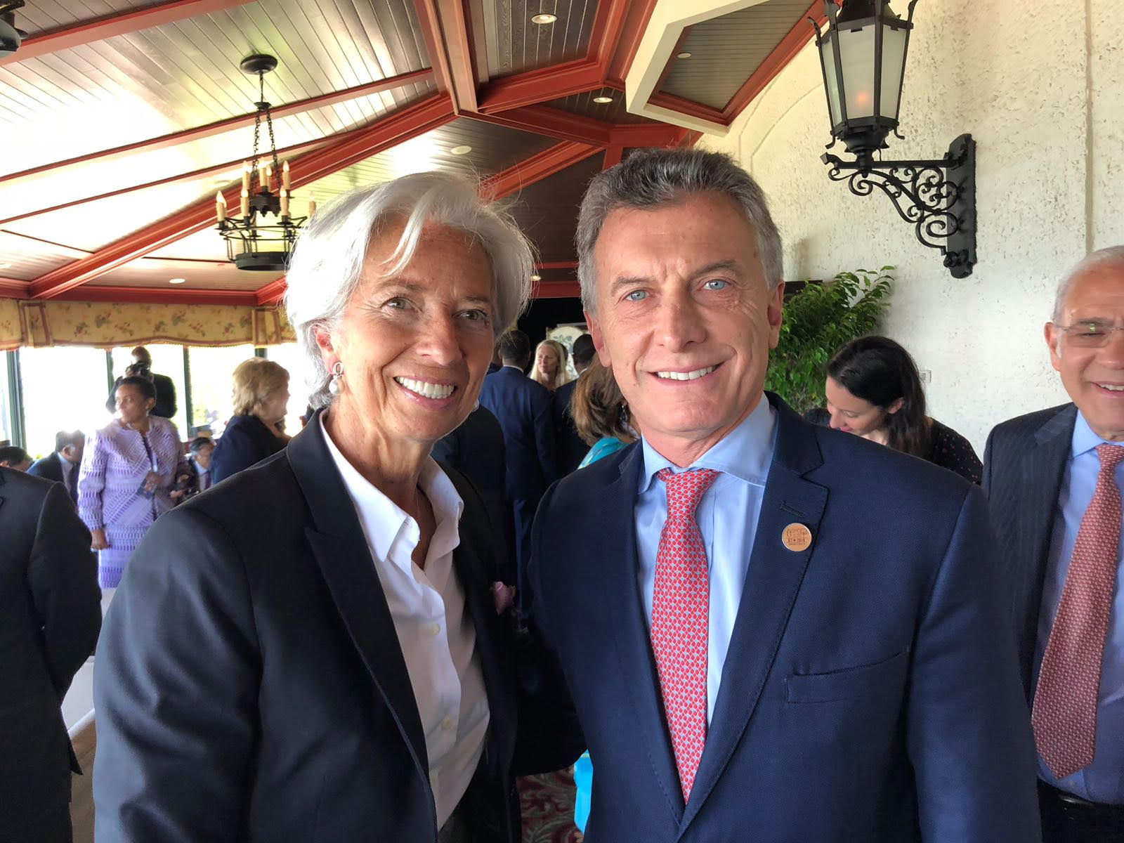 El presidente Mauricio Macri se reunió en Canadá con la directora gerente del Fondo Monetario Internacional (FMI), Christine Lagarde, quien reiteró su respaldo a las reformas económicas que impulsa el Gobierno argentino.